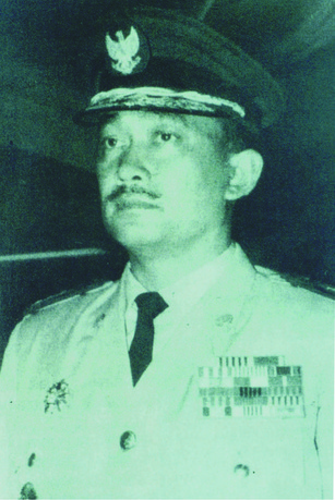 Gubernur Jawa Barat Sanusi Hardjadinata (1951-1956)